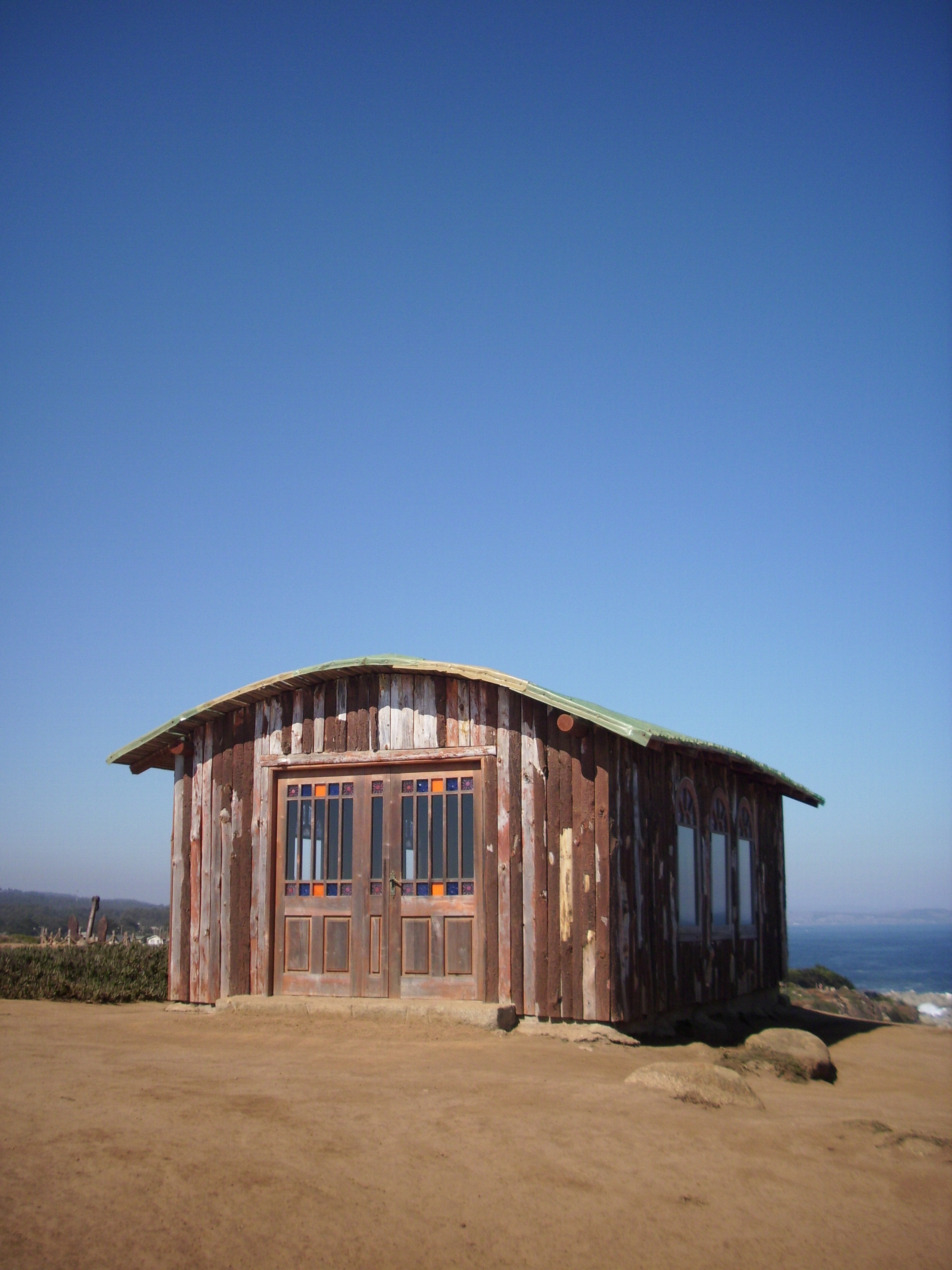 La «cabañita de troncos» construida en los terrenos de Cantalao, proyecto artístico y cultural impulsado en Isla Negra por el poeta chileno Pablo Neruda. Fotografía del 17 de abril de 2012.